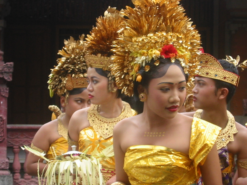 Balinese Dancers